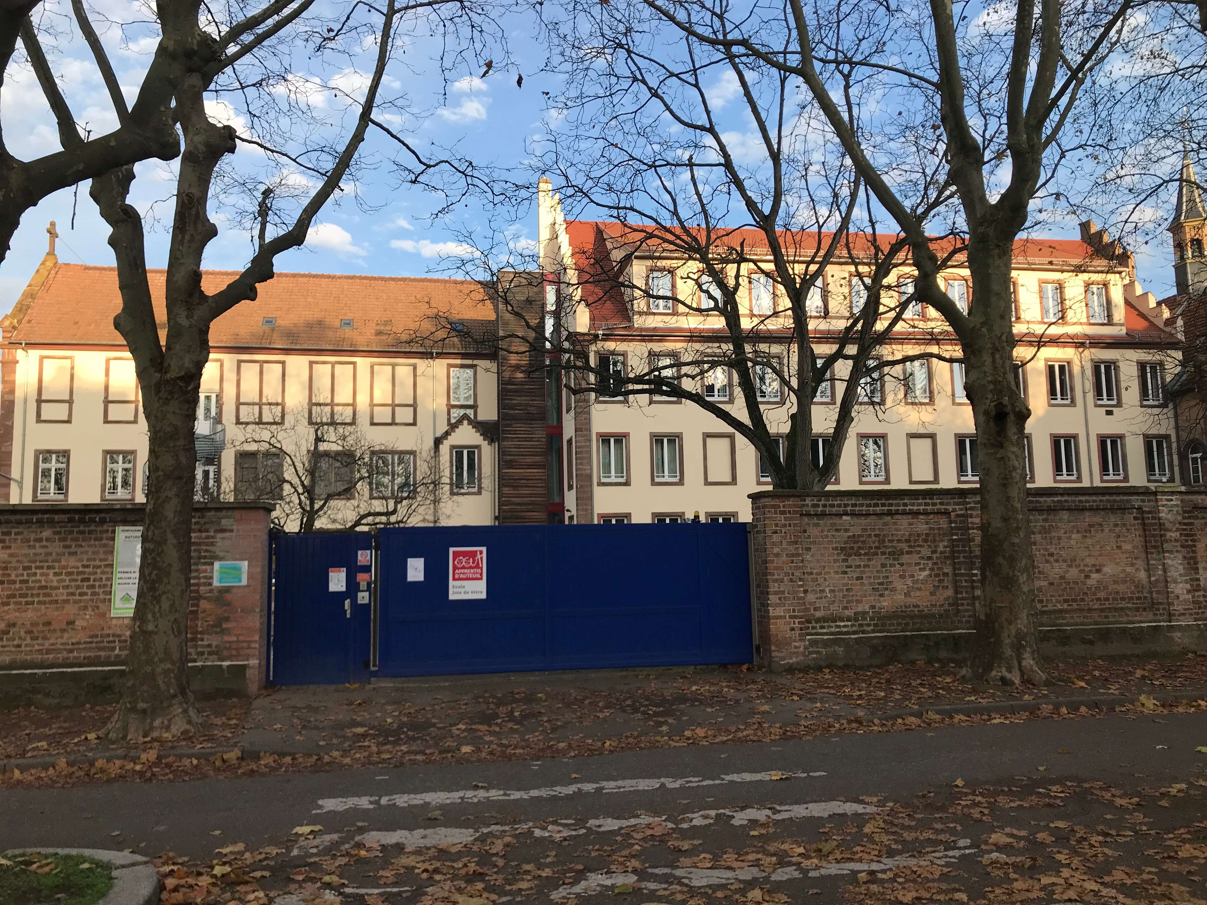 Photo - Ecole Joie de Vivre Strasbourg- Avant de l'école